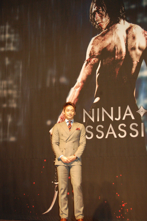 닌자 어쌔신 정지훈